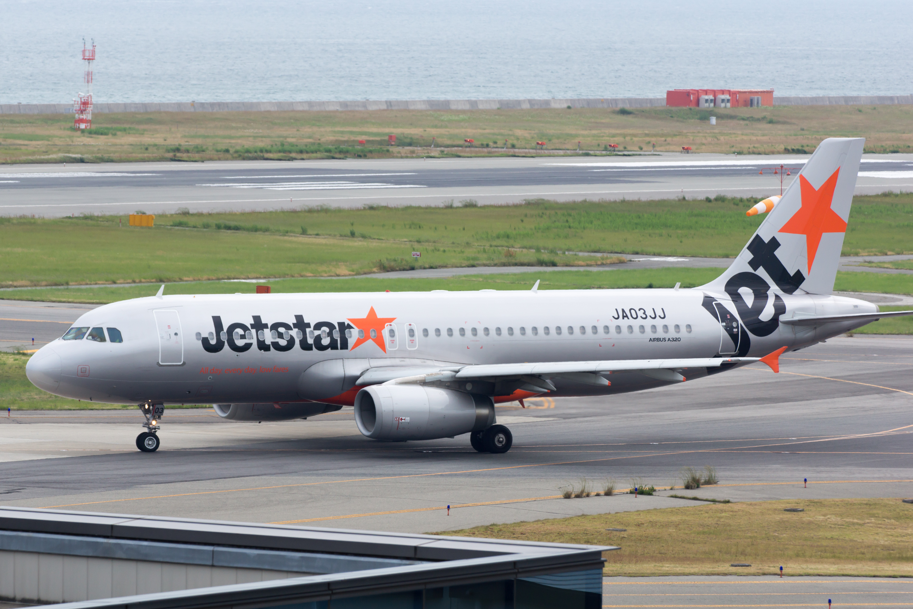 Jetstar Japan / ジェットスター・ジャパン Airbus A320-232 JA03JJ GK353, Departed to Naha Osaka Kansai Int'l Airport